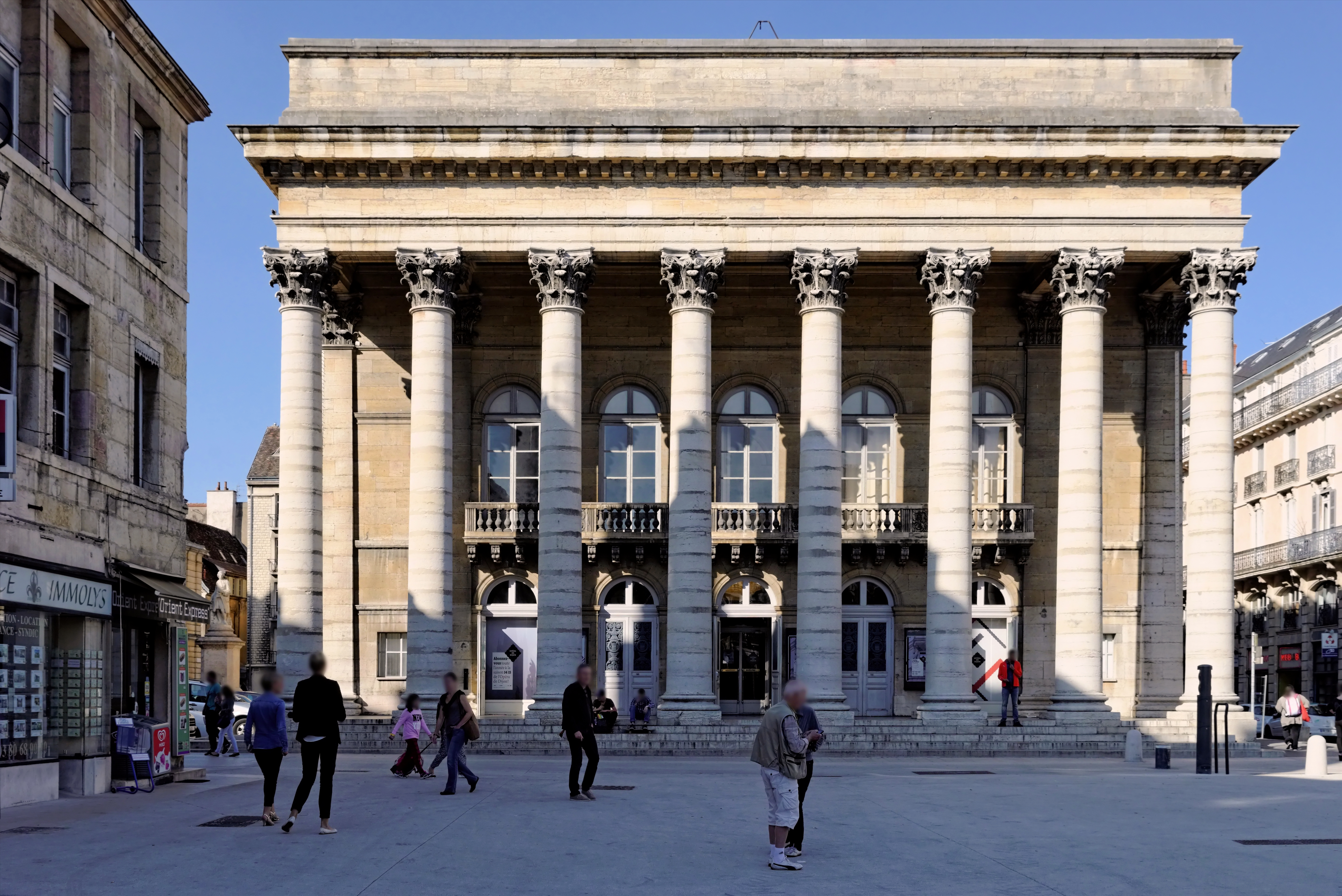 Grand Théâtre de Dijon, depuis le nouvel aménagement de la place du Théâtre. (Dijon, Côte d'Or, Bourgogne, France) .